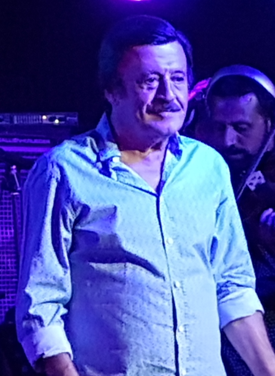 Selami Şahin